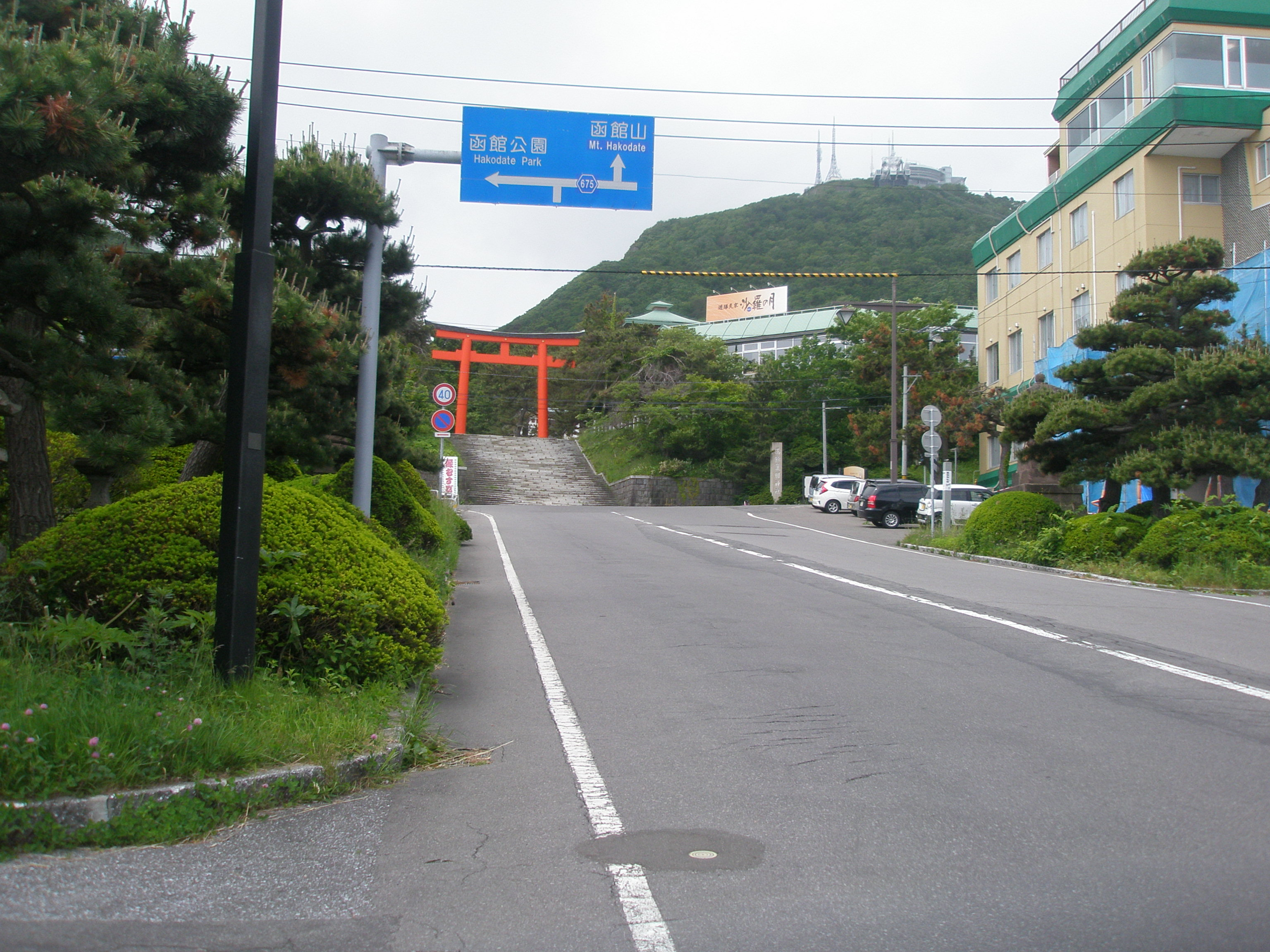 北海道道675号立待岬函館停車場線・市道日暮し通交点1（終点側（高田屋通）より）右折先が本線